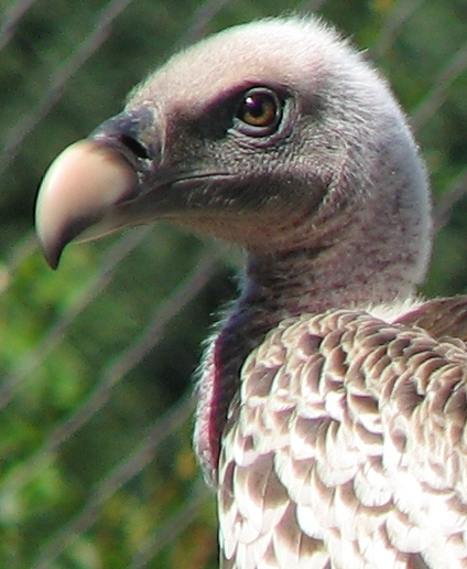 Rupell's Griffon Vulture